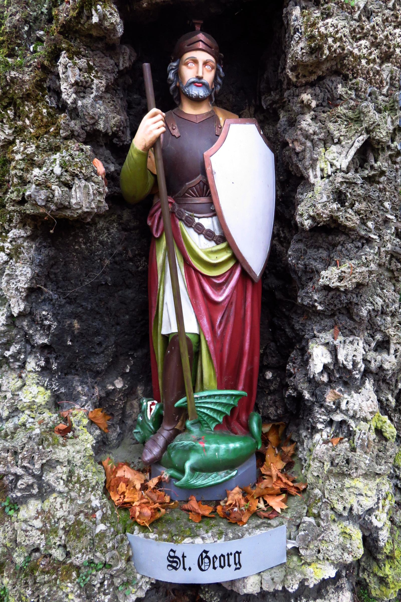 Grottenanlage in Hehn Heiligenpesch